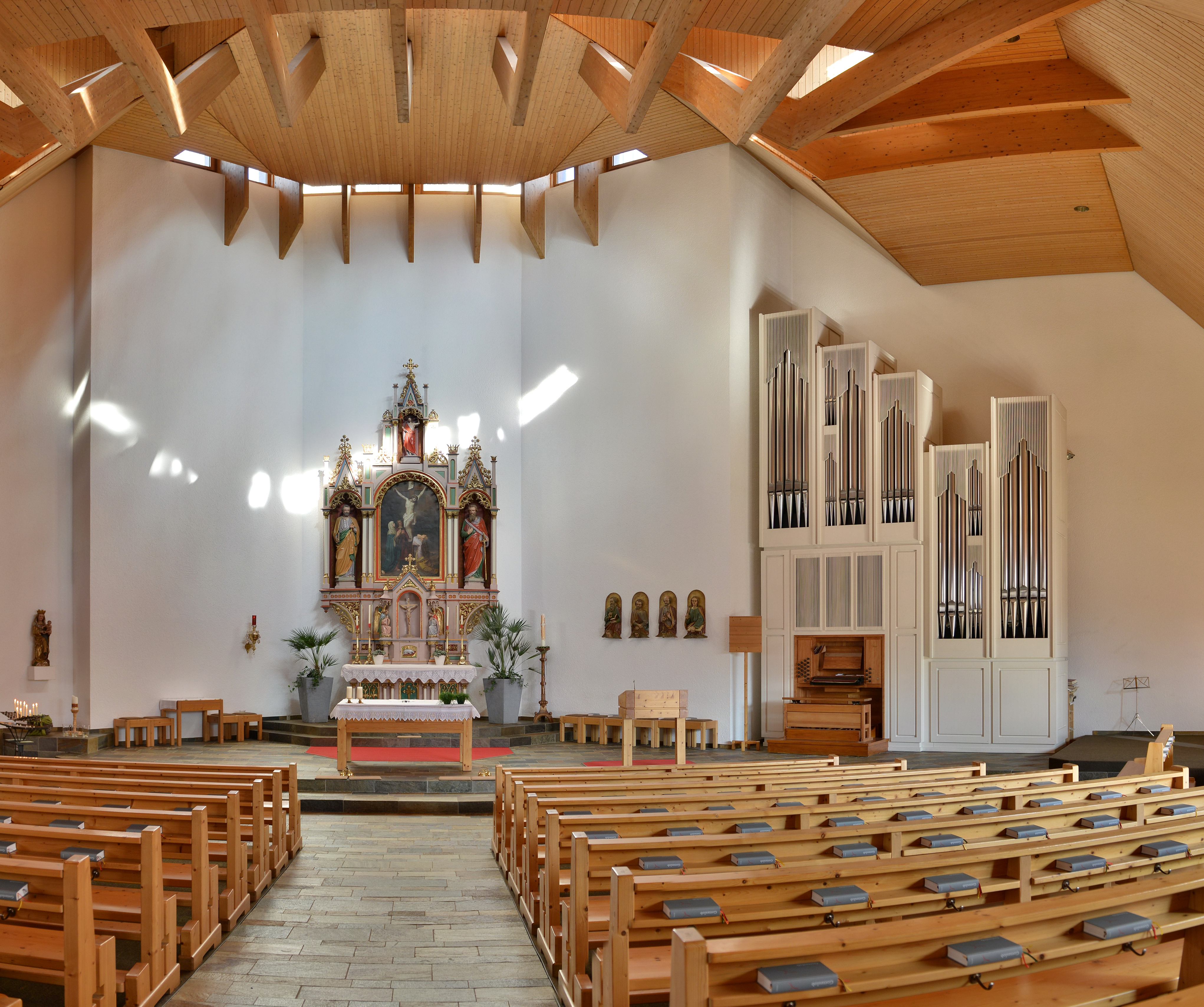 Pfarrkirche Hl. Antonius Eremit in Mellau. Modernerer Betonbau mit älterem Turm mit Giebelspizthelm. 1980-1982 vollständiger Neubau mit Ausnahme des Turmes durch die Architekten Hermann Keckeis und Vonier. Orgel 1876 von Anton Behmann, 1950 umgebaut.